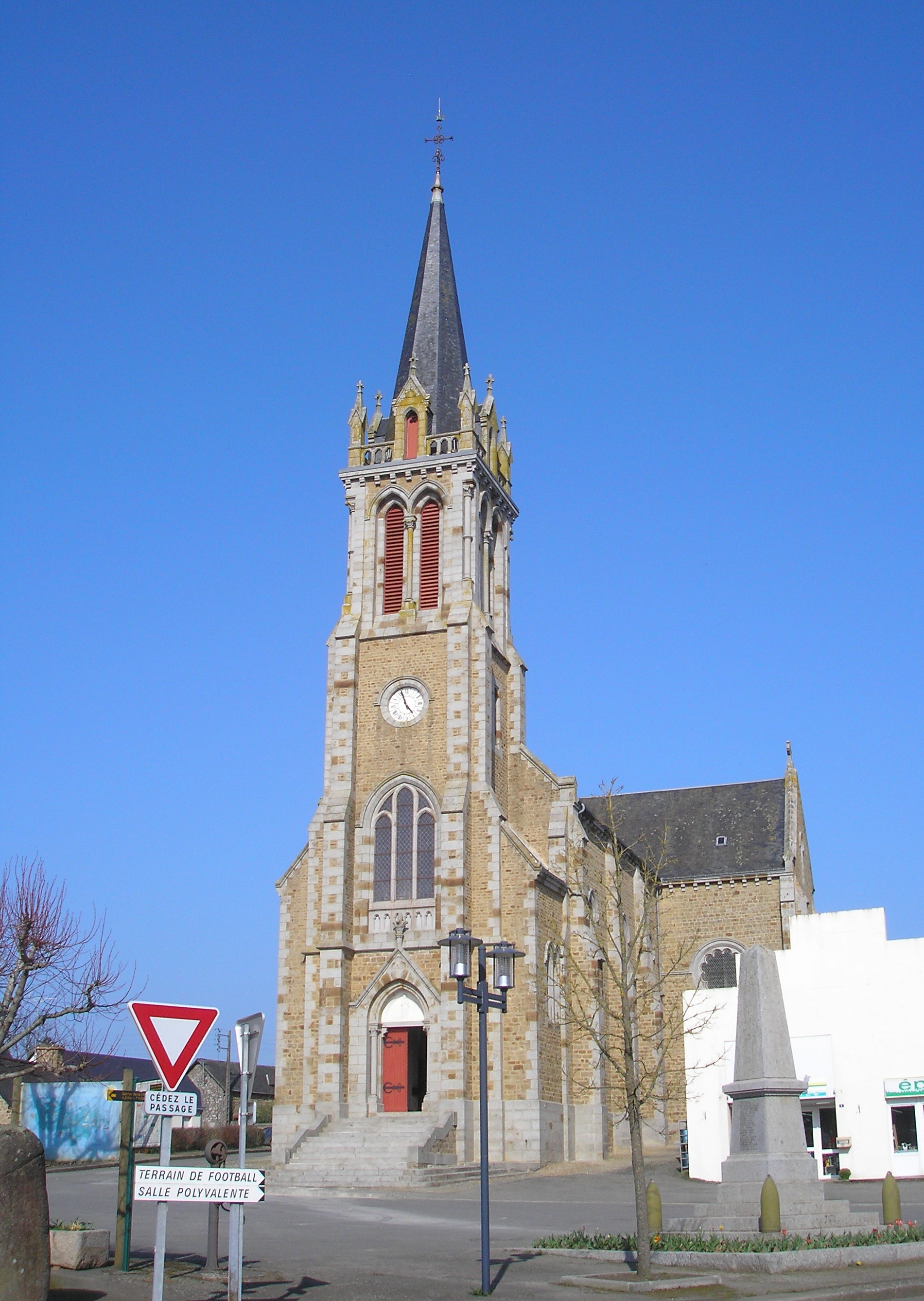 Désertines (Pays de la Loire, France). L'église Saint-Pierre.